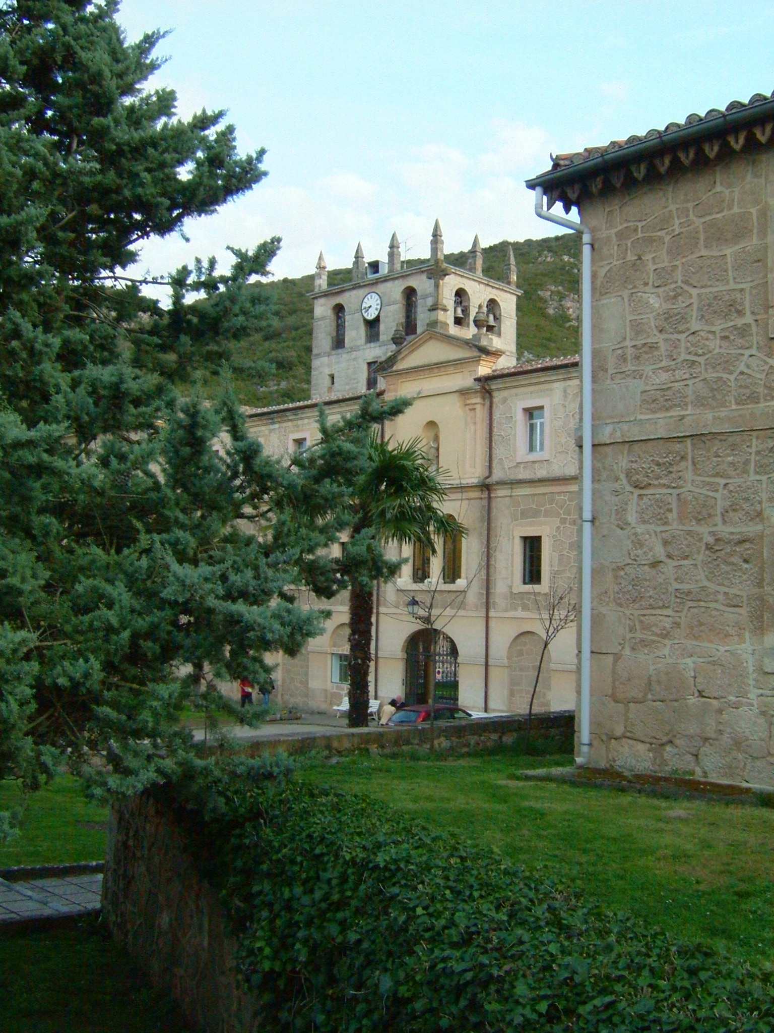 Monasterio de Bugedo (Burgos, Spain)